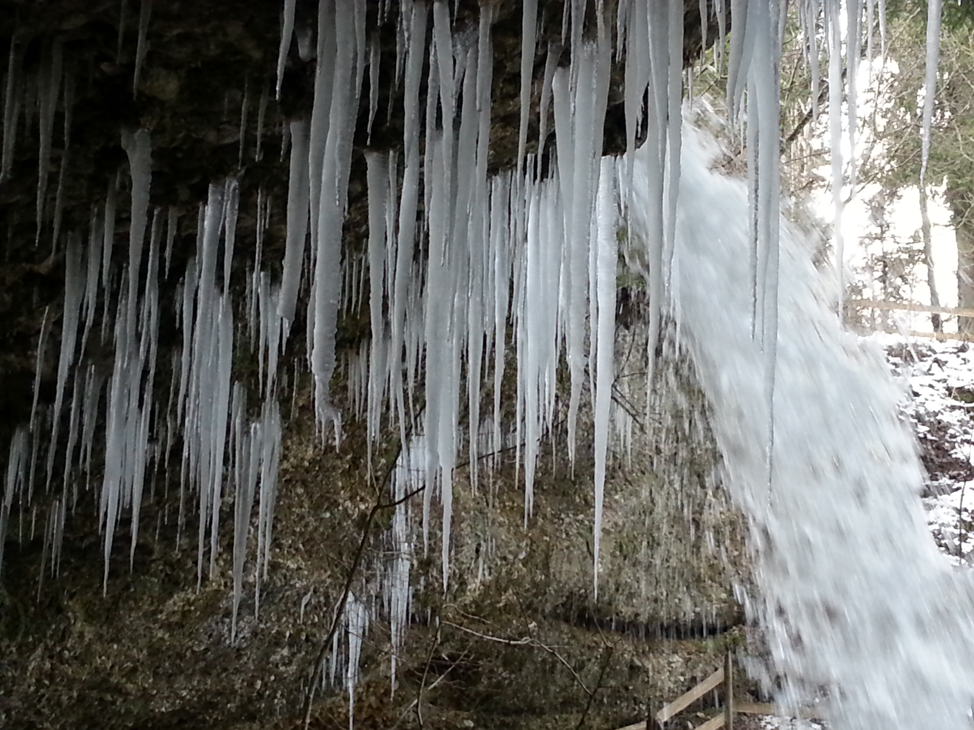 Scheidegger Wasserfälle im Allgäu, Bayern